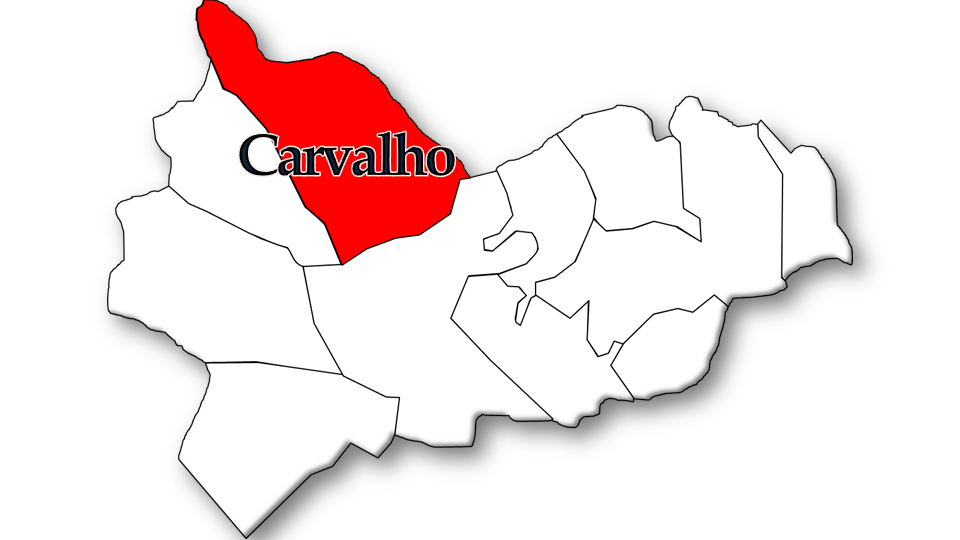 População